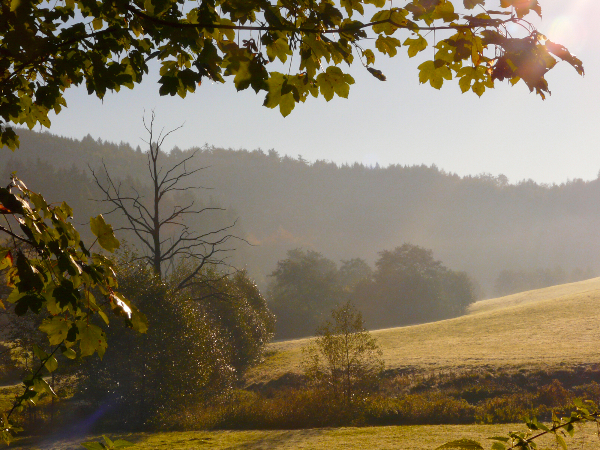 NSG MK-037 Orlebachtal östlich von Wocklum